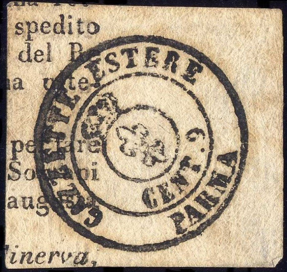 Специальный газетно-налоговый штамп Пармского герцогства